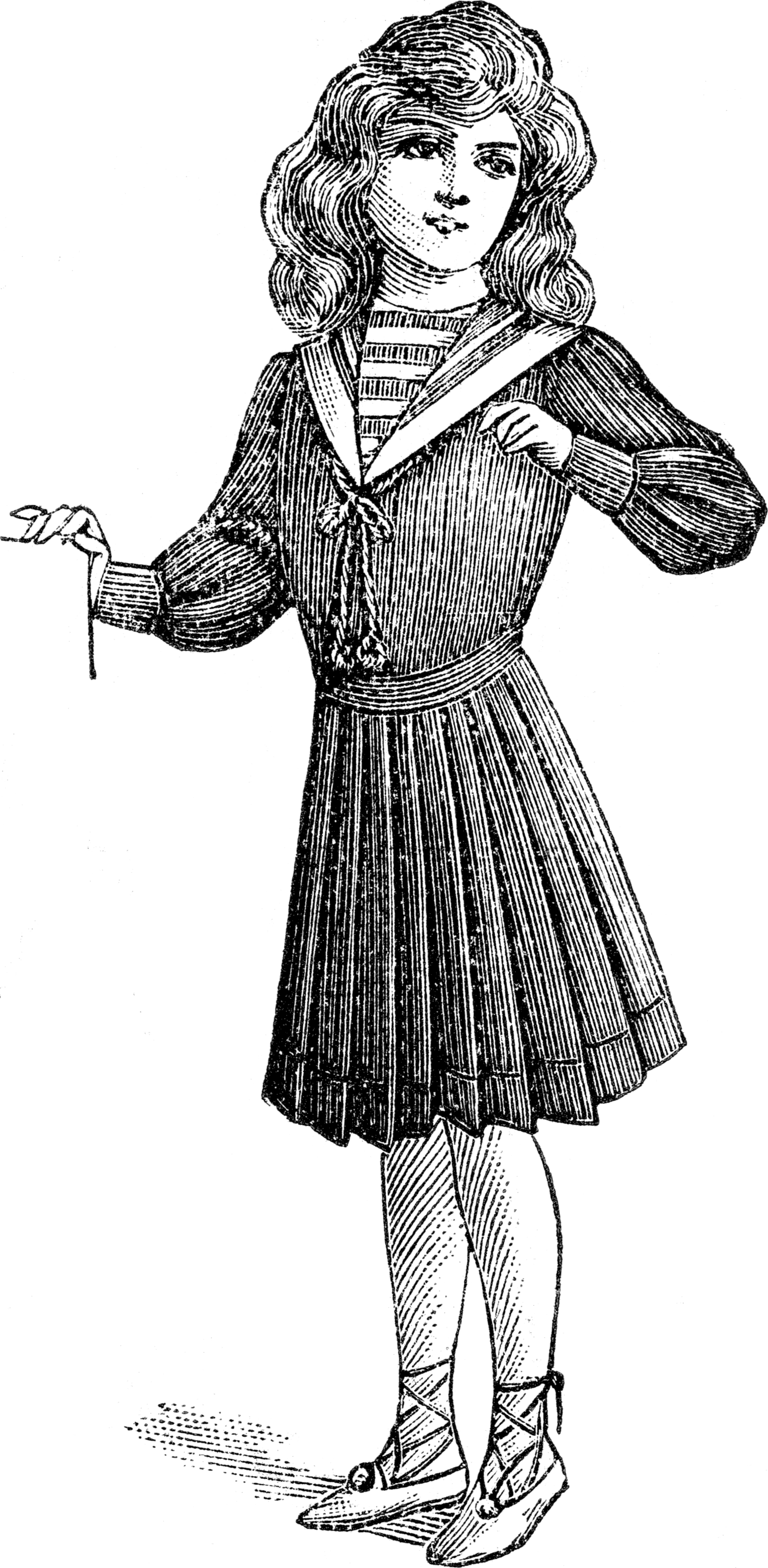 No. 40034 COSTUMES marinière pour fillettes jupe plissée marine, cardinal ou kaki. 2 ans 12.25; 4 ans 13.25; 6 ans 14.25; 8 ans 15.25; 10 ans 16.25; 12 ans 17.25